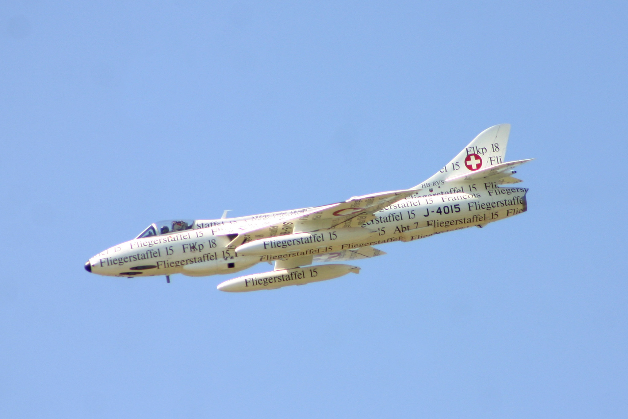 Hawker Hunter FMk58, J-4040 PAPYRUS, Air 04, Payerne, Switzerland